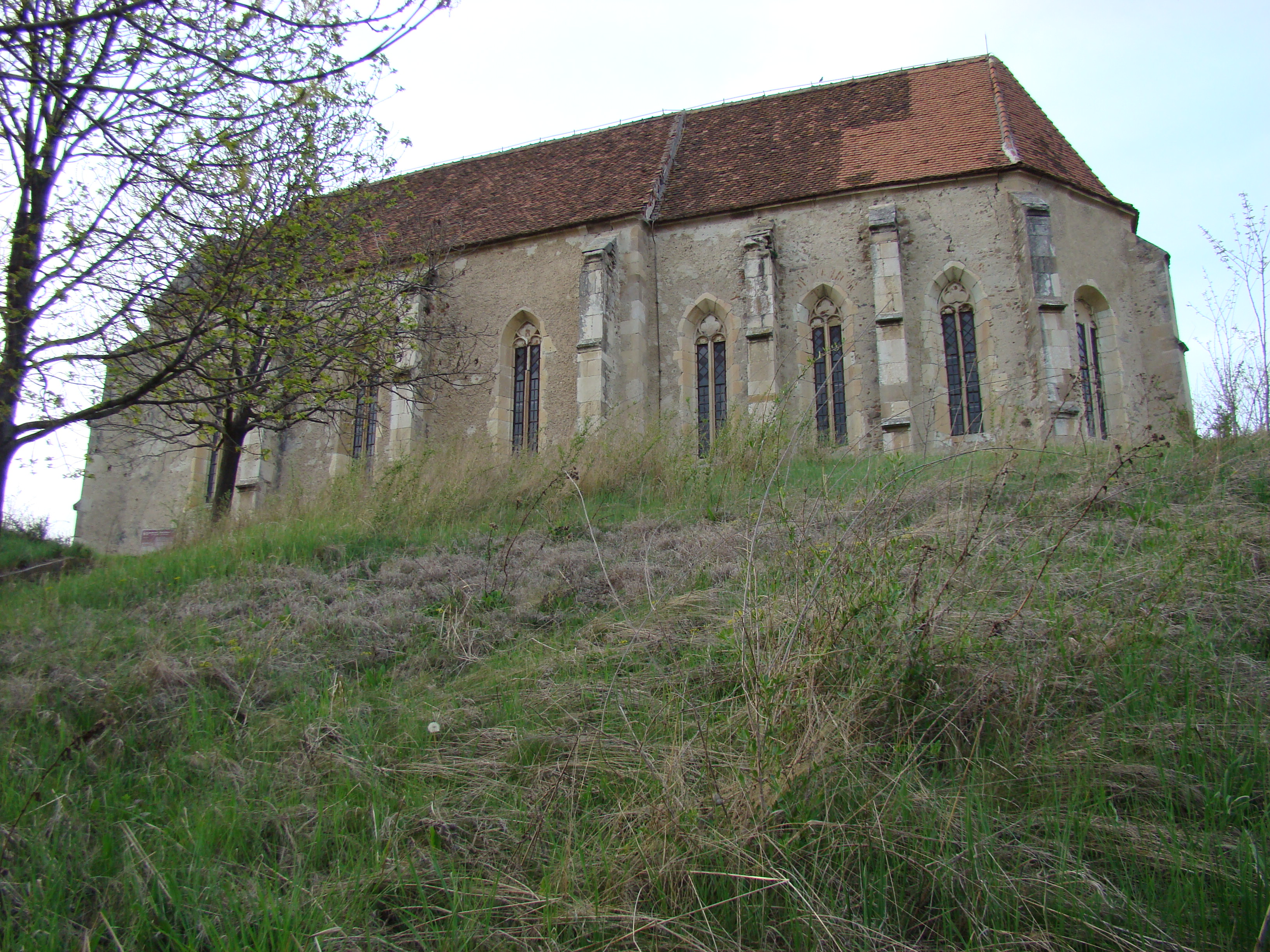 Evangelische Kirche von Vingard (Weingartskirchen), Alba, Siebenbürgen, RumänienRomână: Biserica evanghelică din Vingard (Weingartskirchen), Alba, Transilvania, România